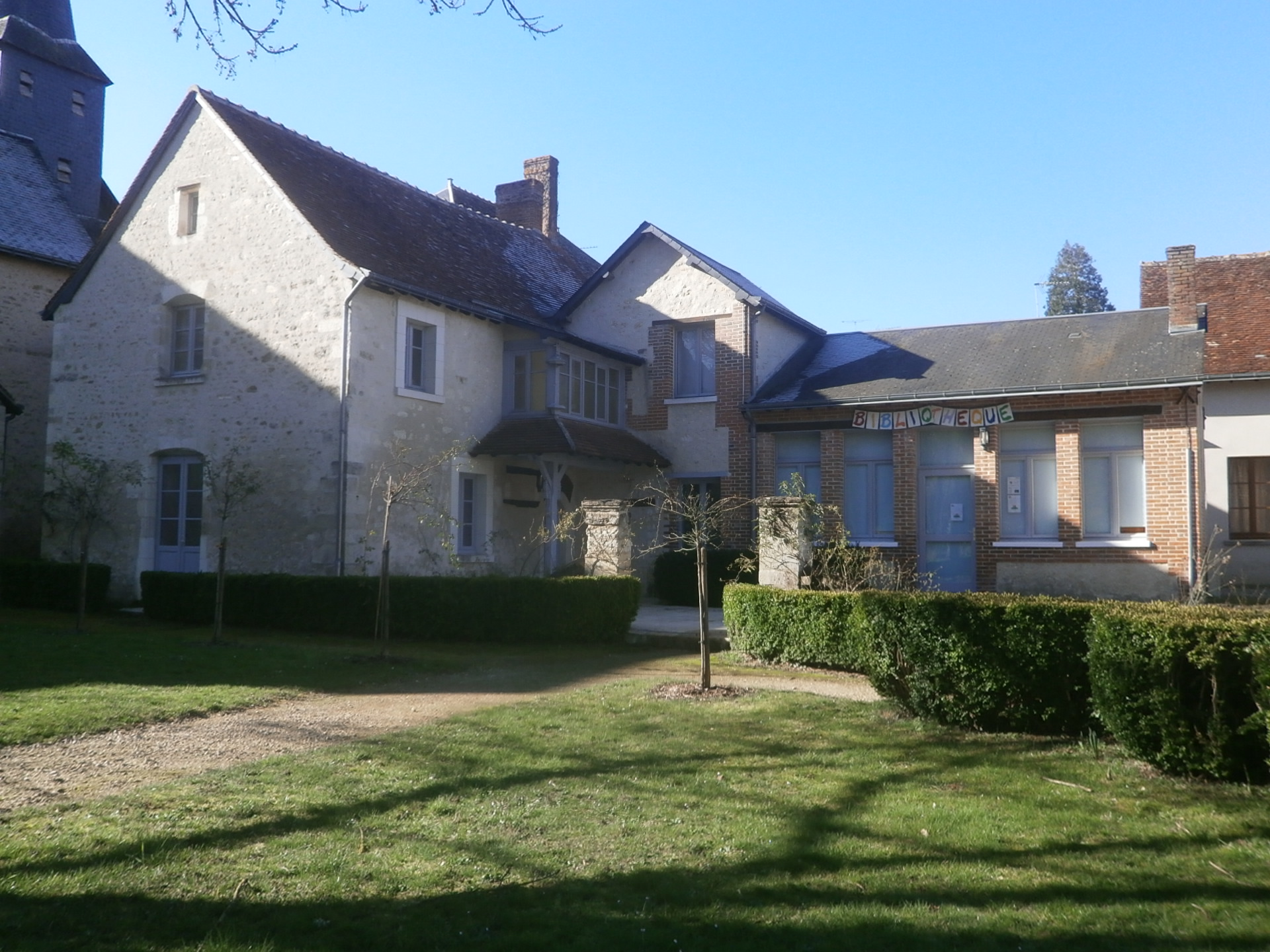 La bibliothèque (ancien presbytère) de Loché-sur-Indrois